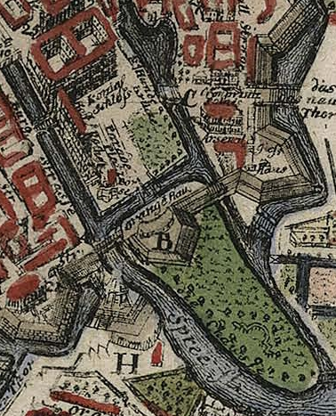 Lage des Lustgartes und der Orangerie in Berlin